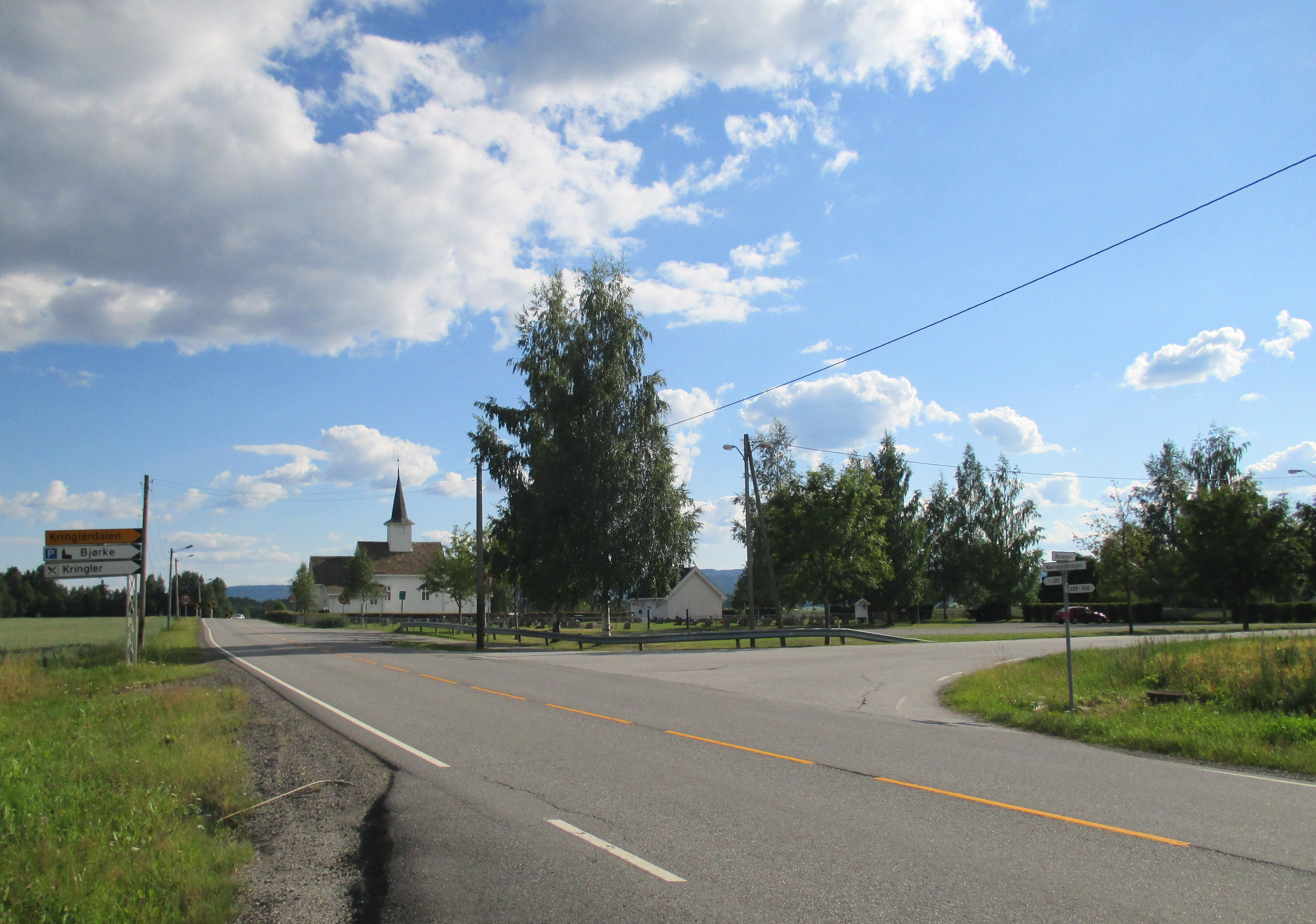 Åsvegen (fylkesvei 527) begynner ved primær fylkesvei 120 rett nord for Bjørke kirke